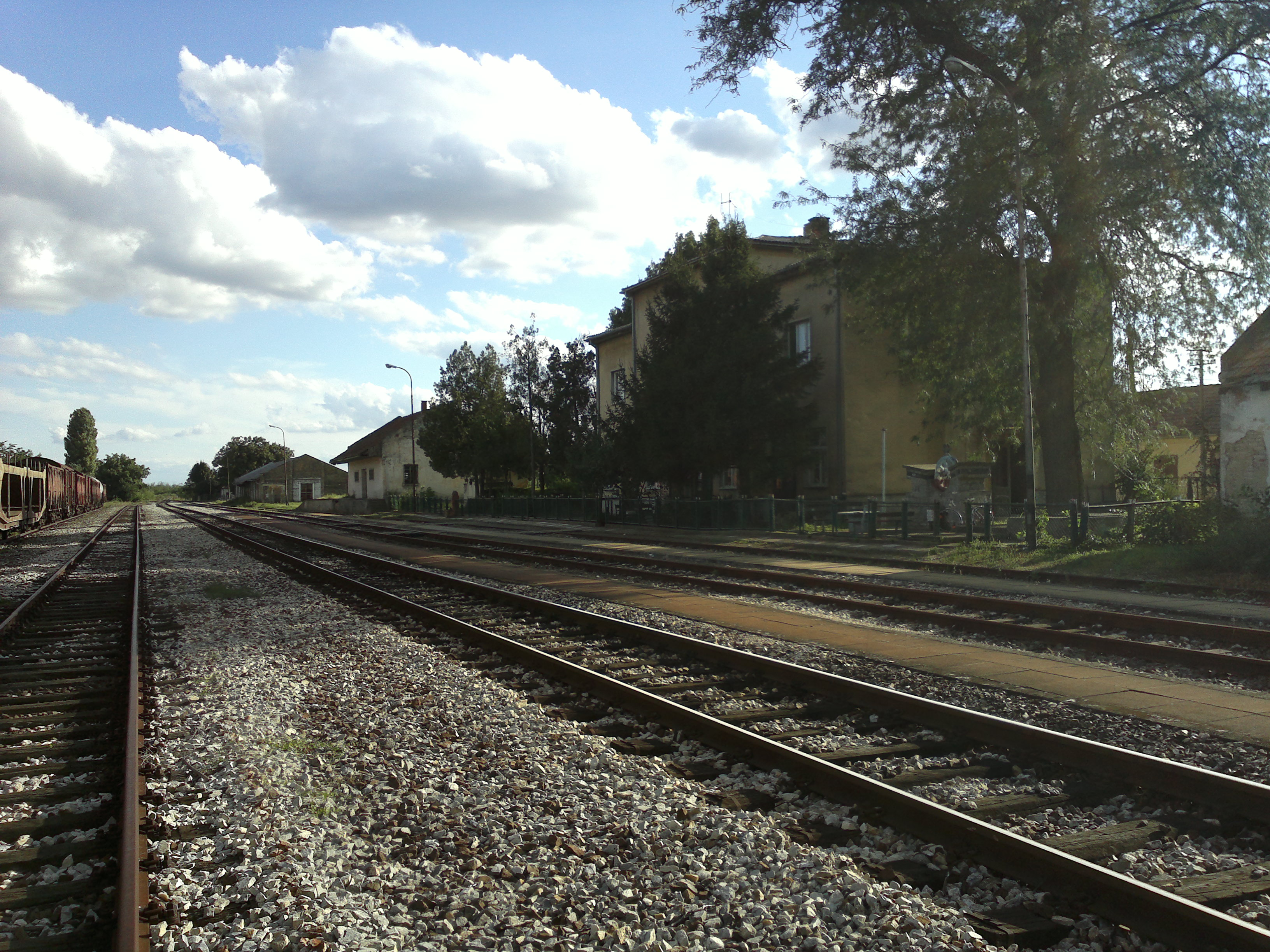 Template:За Оставу Licensing